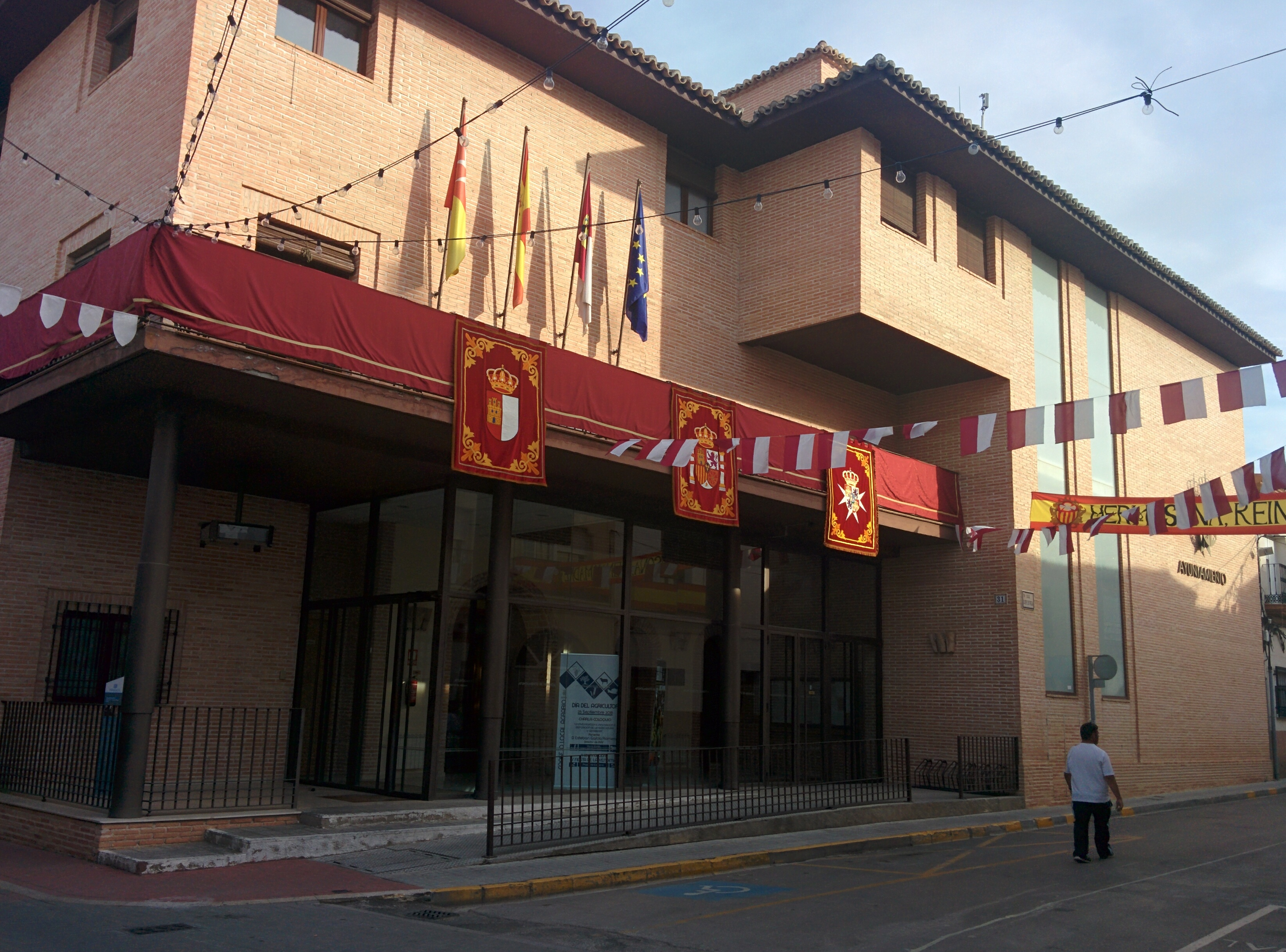 Casa consistorial de Herencia (Ciudad Real, España).